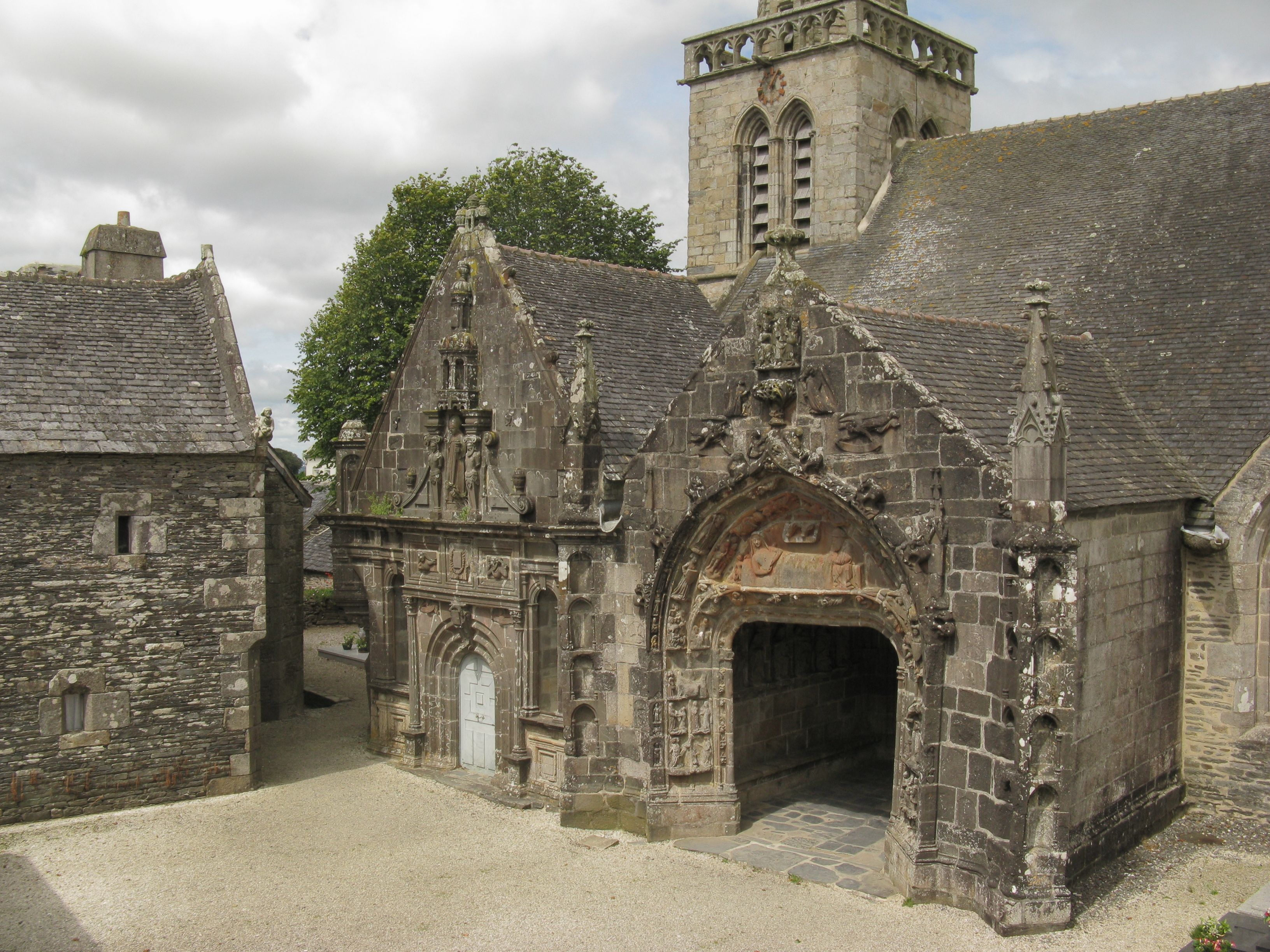 Kerk van La Martyre, Bretagne